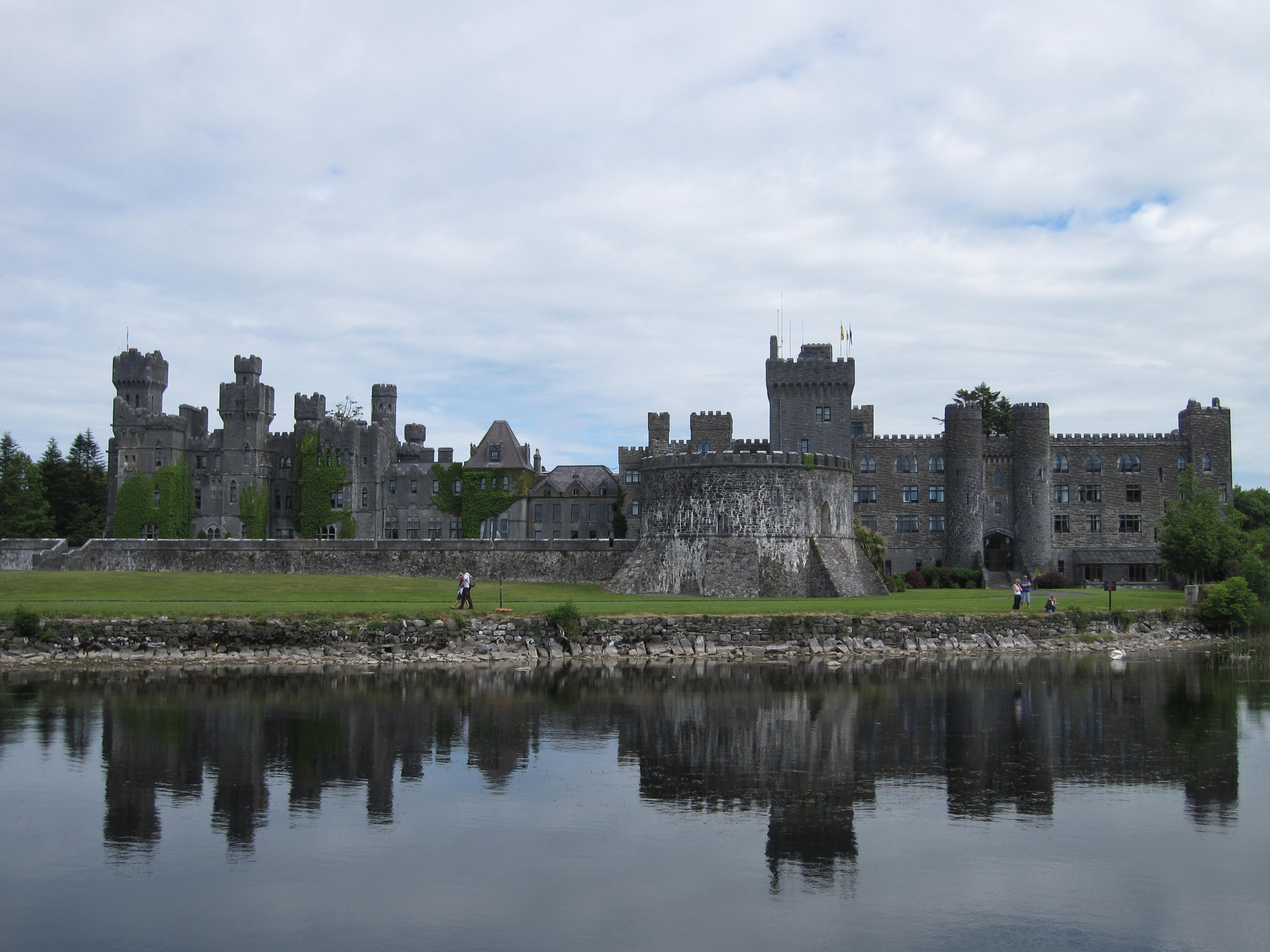 טירת אשפורד בצילום מלוך קוריב